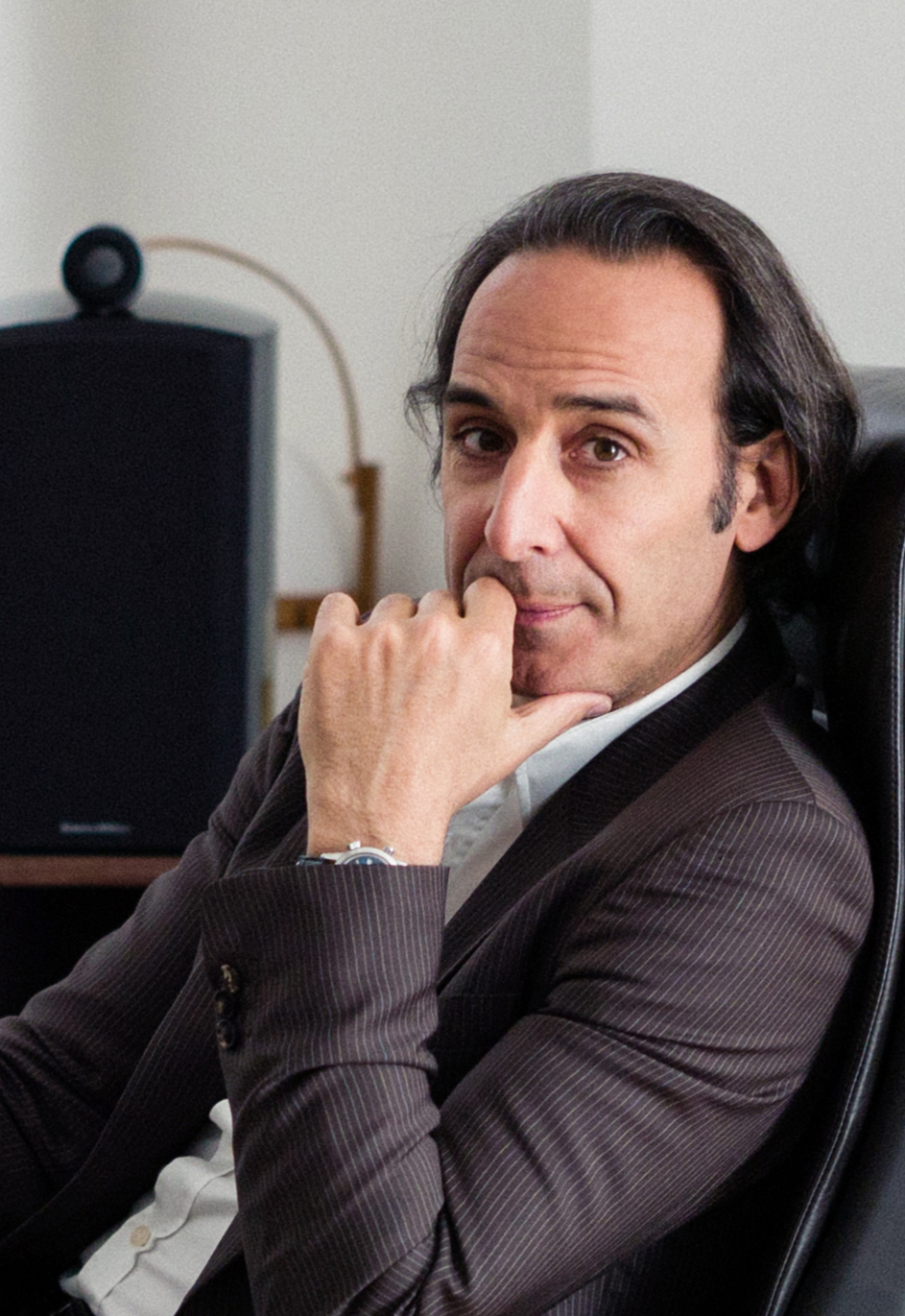 le compositeur Alexandre Desplat